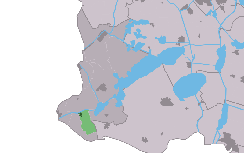 Kaartsje fan himrik fan Warns